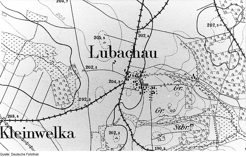 Original image description from the Deutsche FotothekBautzen-Lubachau. Meßtischblatt, Sekt. Luttowitz, 1884